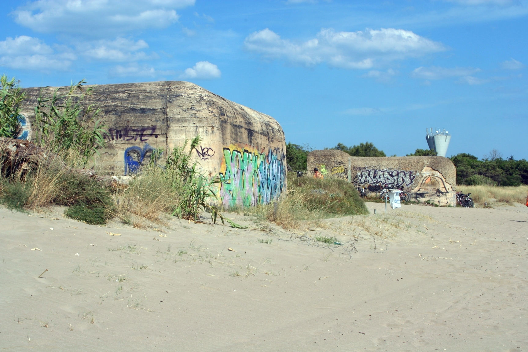 Blockhaus de la Seconde guerre mondiale sur la plage de la Tamarissière à Agde (Hérault, France).